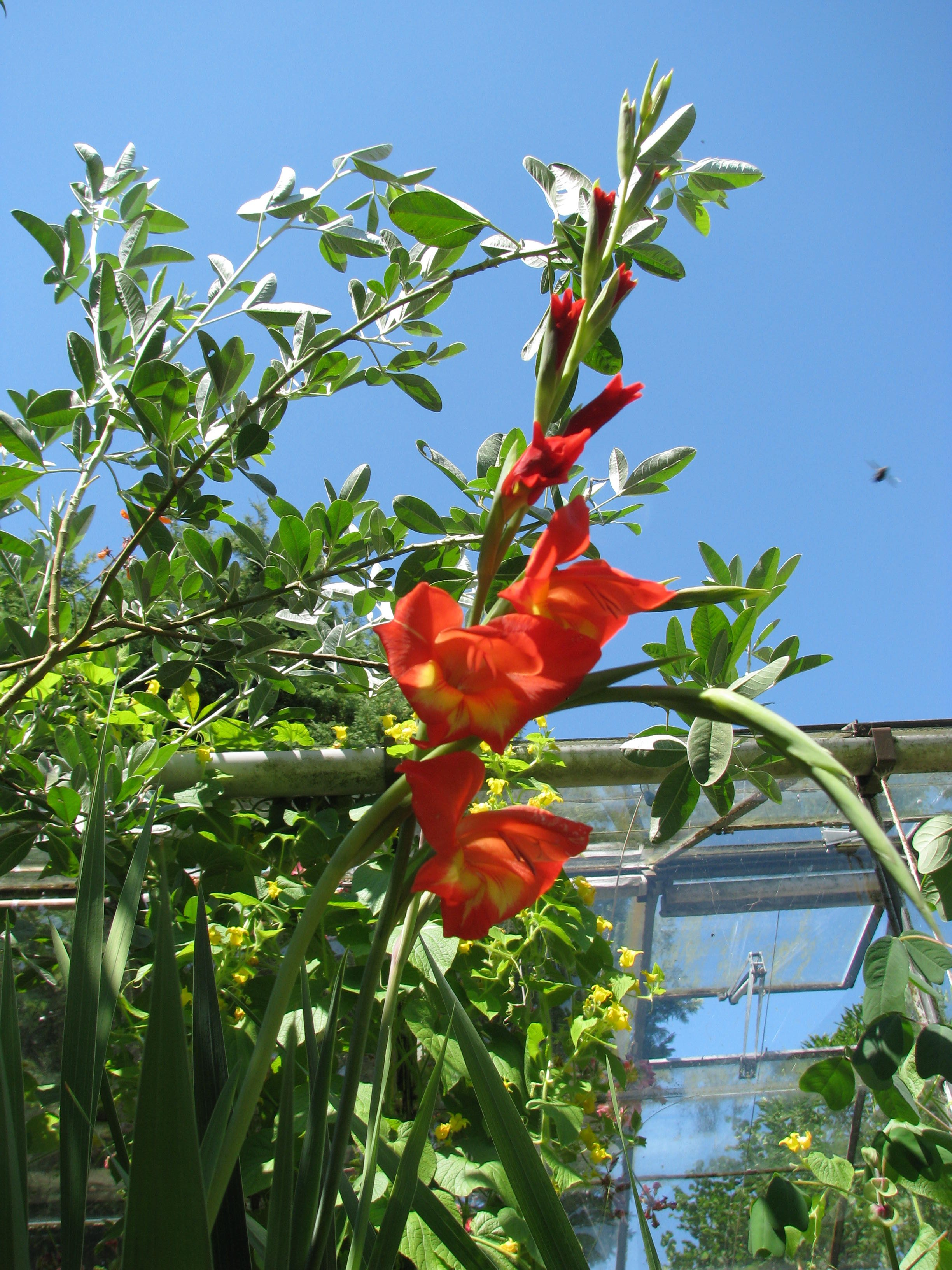 Gladiolus garnieri